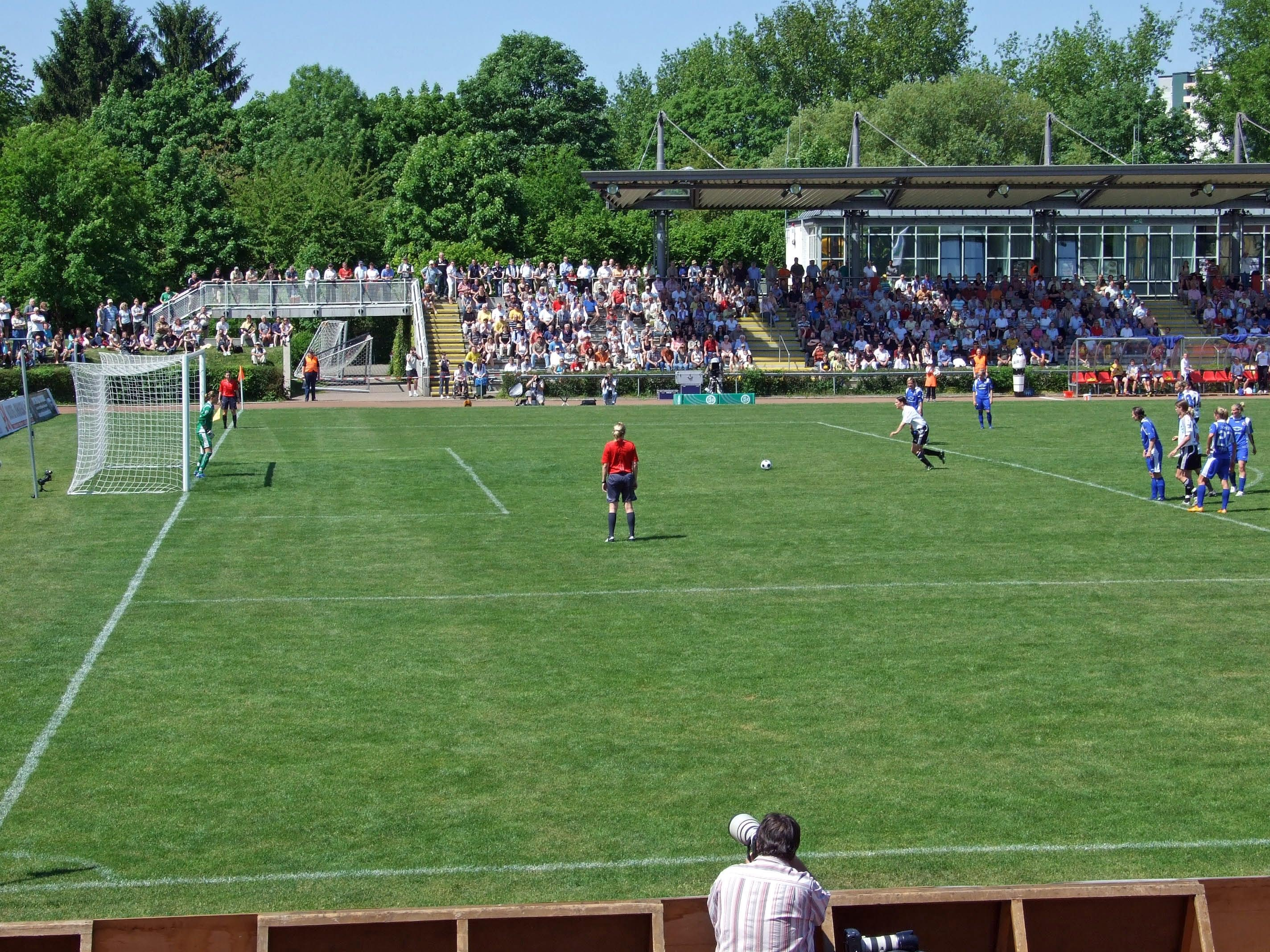 Foulelfmeter, getreten von Birgit Prinz vom 1.FFC Frankfurt, 2008